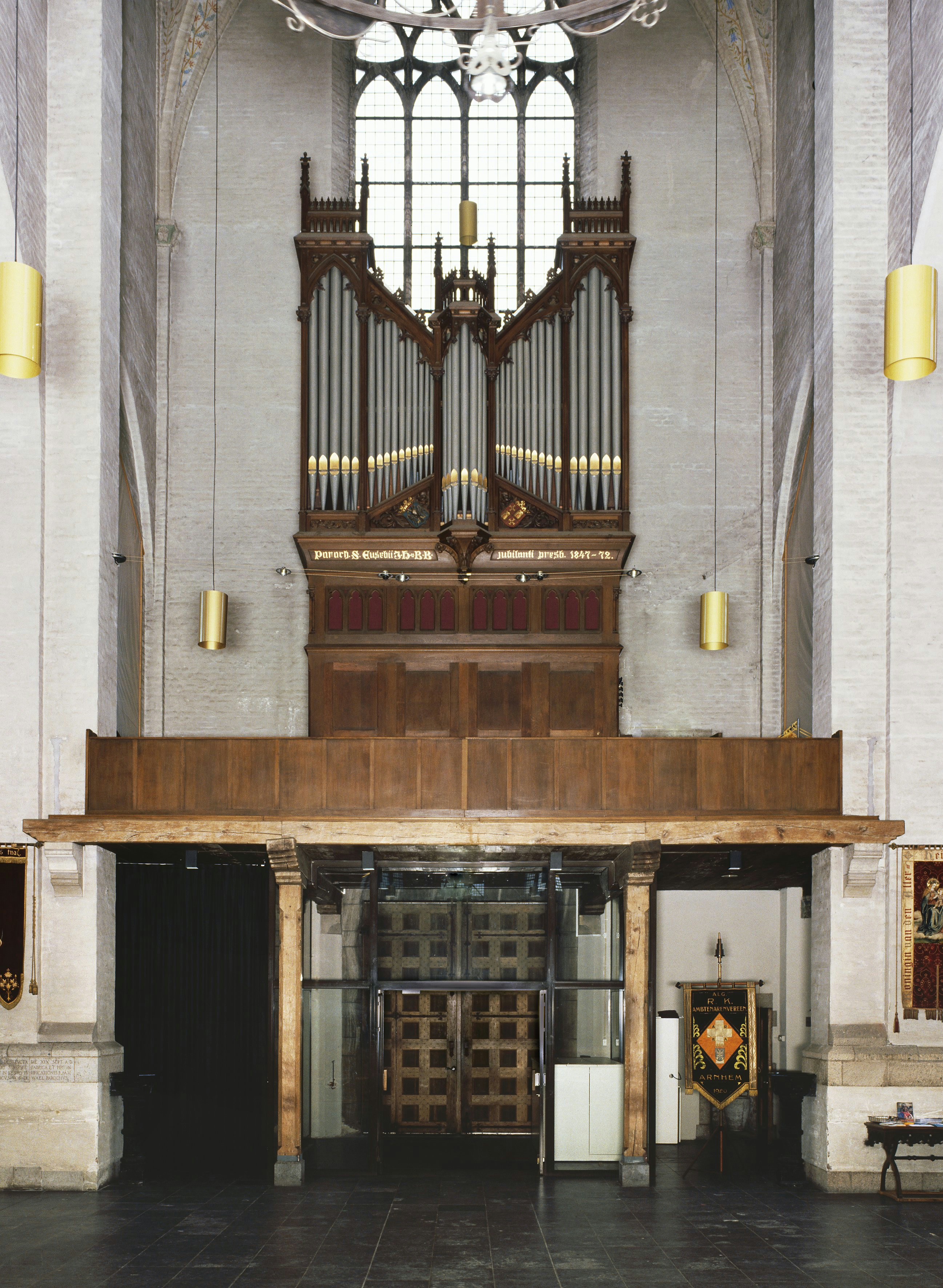 St. Walburgiskerk: Intenieur, aanzicht orgel, orgelnummer 100 (opmerking: Gefotografeerd voor Het Historische Orgel in Nederland 1872-1878, bladzijde 182)